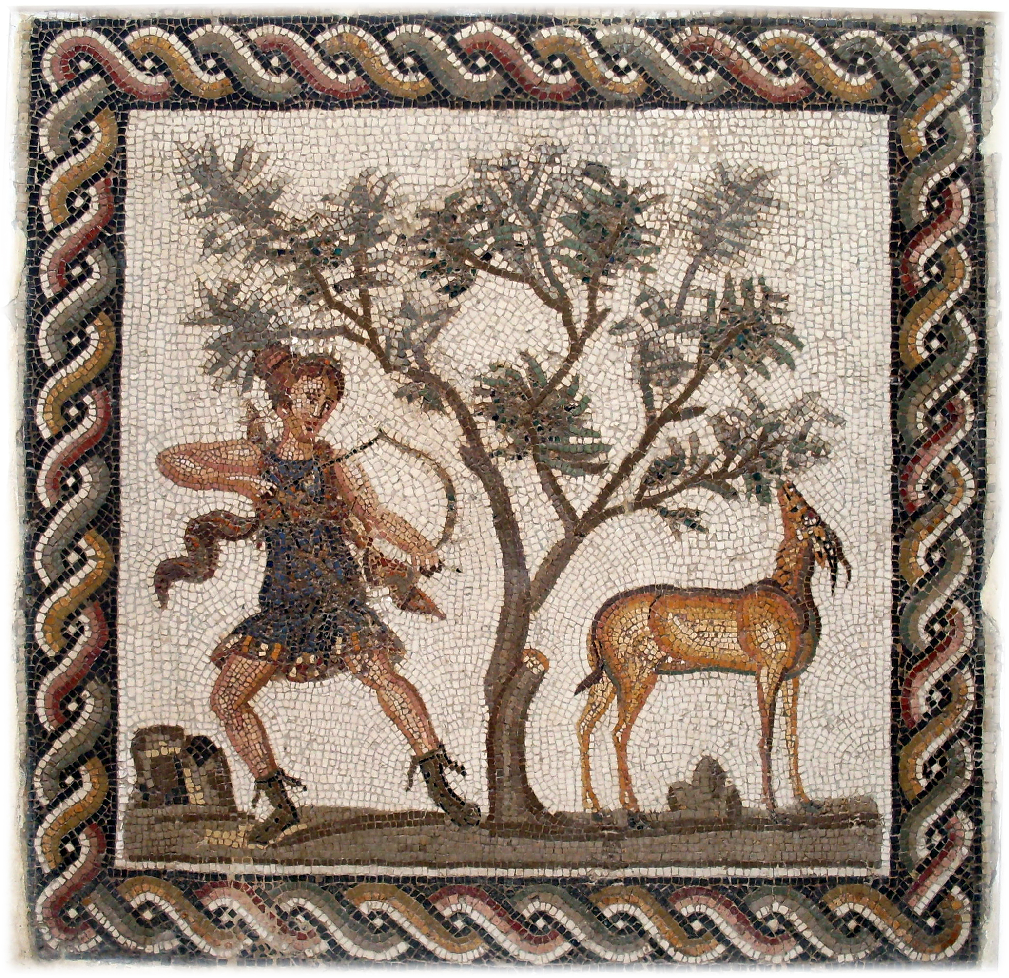 Mosaïque retrouvé à Utique représentant Diane chasseresse, 2ème moitié du IIème siècle a. p.